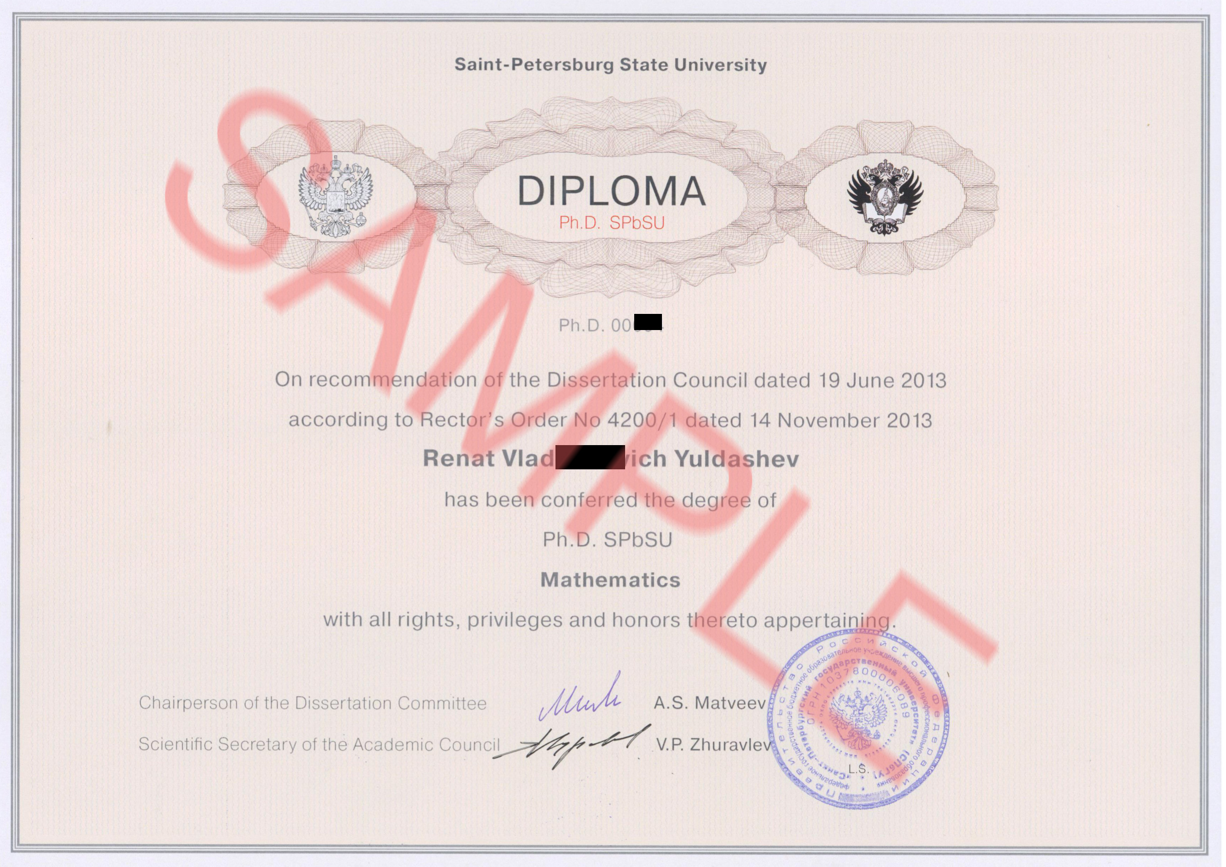 Образец диплома Ph.D. SPbSU, выдаваемого в Санкт-Петербургском Государственном Университете (2013 г.)